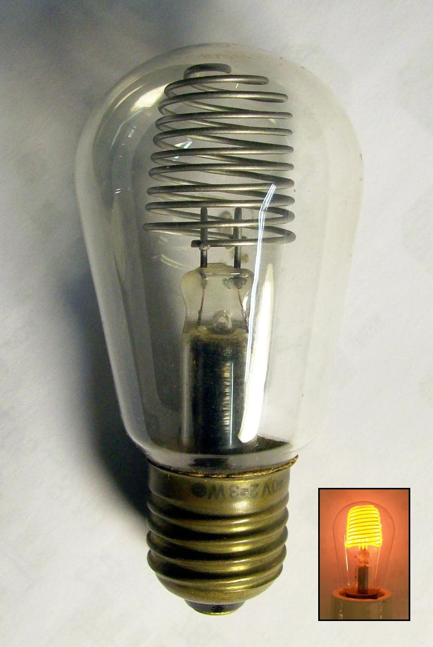 Bienenkorbglimmlampe 2-3Watt 220Volt Sockel E27